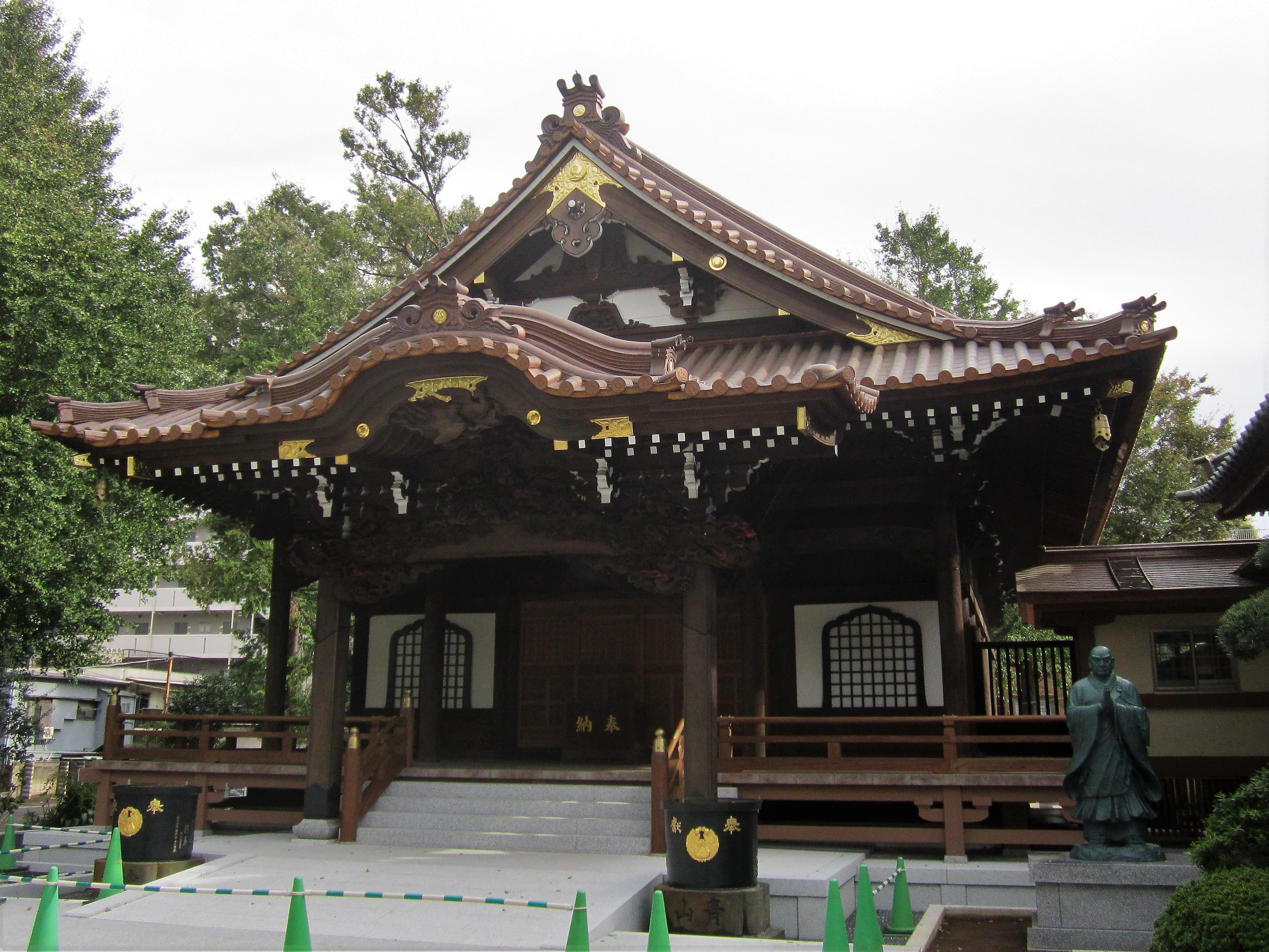 正覚寺・鬼子母神堂（目黒区中目黒）